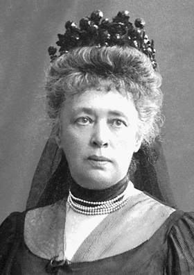 Bertha von Suttner, Nobel Peace Prize 1905